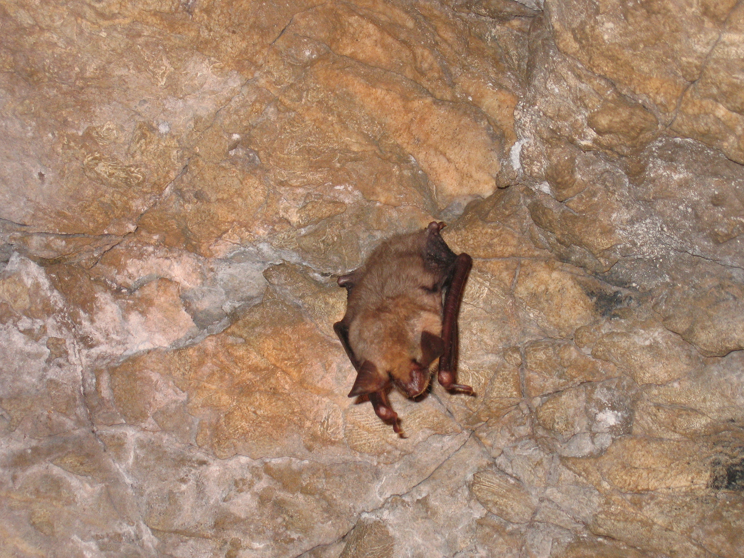 Aggertalhöhle in Engelskirchen-Ründeroth